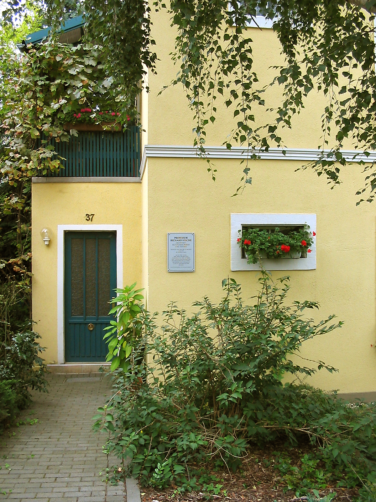 Plakette an Franz Richard Steches Mops-Haus, Radebeul, 2008